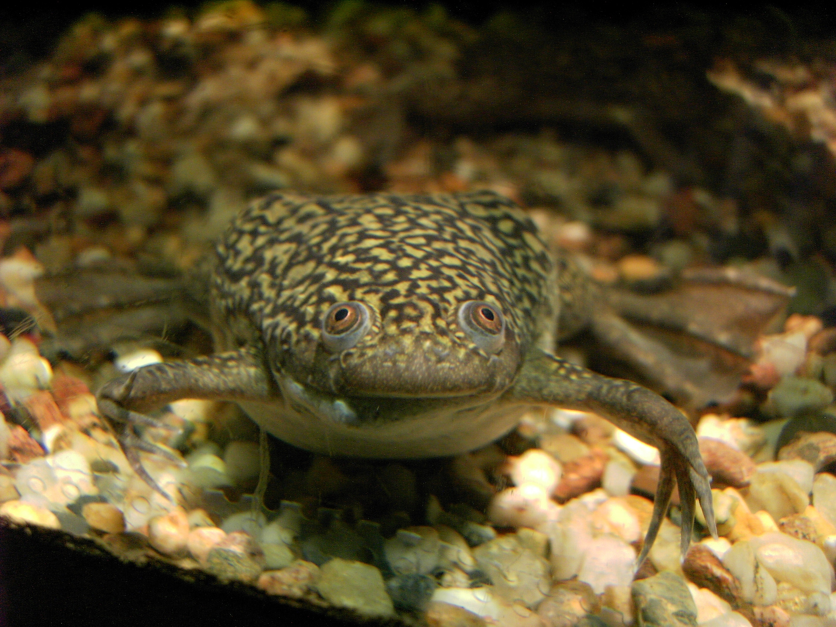 Frontalansicht eines Gemeinen Krallenfrosches (Xenopus laevis)aus Afrika